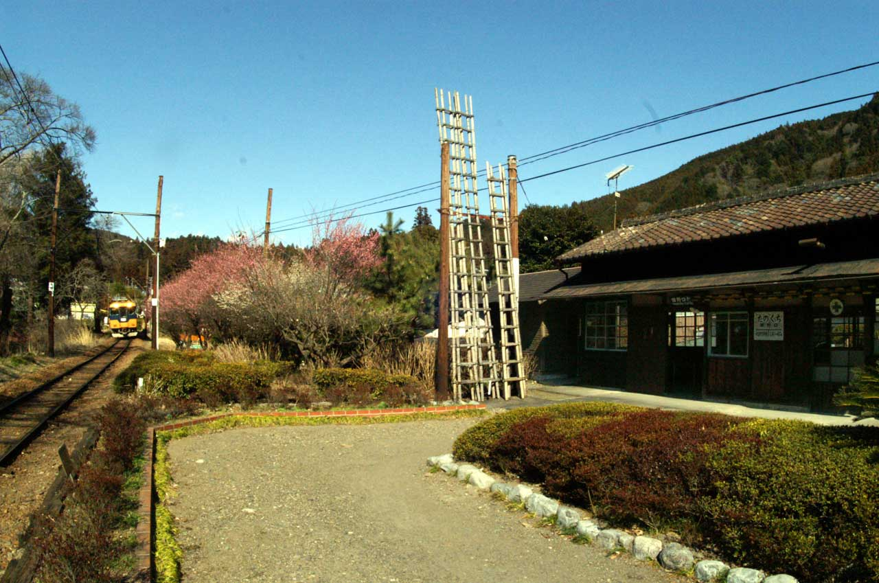 田野口駅